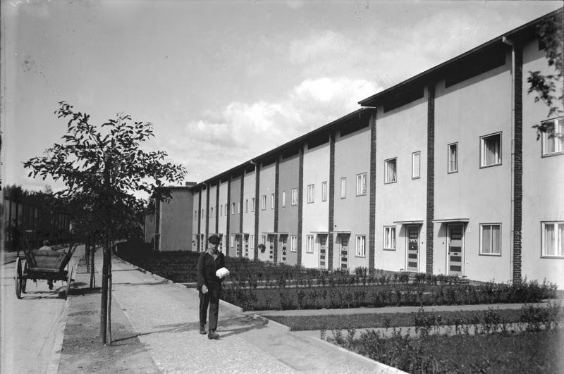 BArch-description This is a picture of the Berliner Kulturdenkmal (cultural monument) with the ID 09075604 |comment= |biased= |headline=Berlin-Zehlendorf, Mustersiedlung |caption=Eine Mustersiedlung von 35 Wohnhäusern mit 120 Wohnungen, wurde in Berlin-Zehlendorf nach den modernsten Grundsätzen erbaut. Die Mustersiedlung wird allen am Bauwesen und an der Besiedlung interessierten Kreisen zugängig sein. Blick in eine sonnige und luftige Strasse der Mustersiedlung mit seinen hübschen Vorgärten in Berlin-Zehlendorf. |extra= |people=